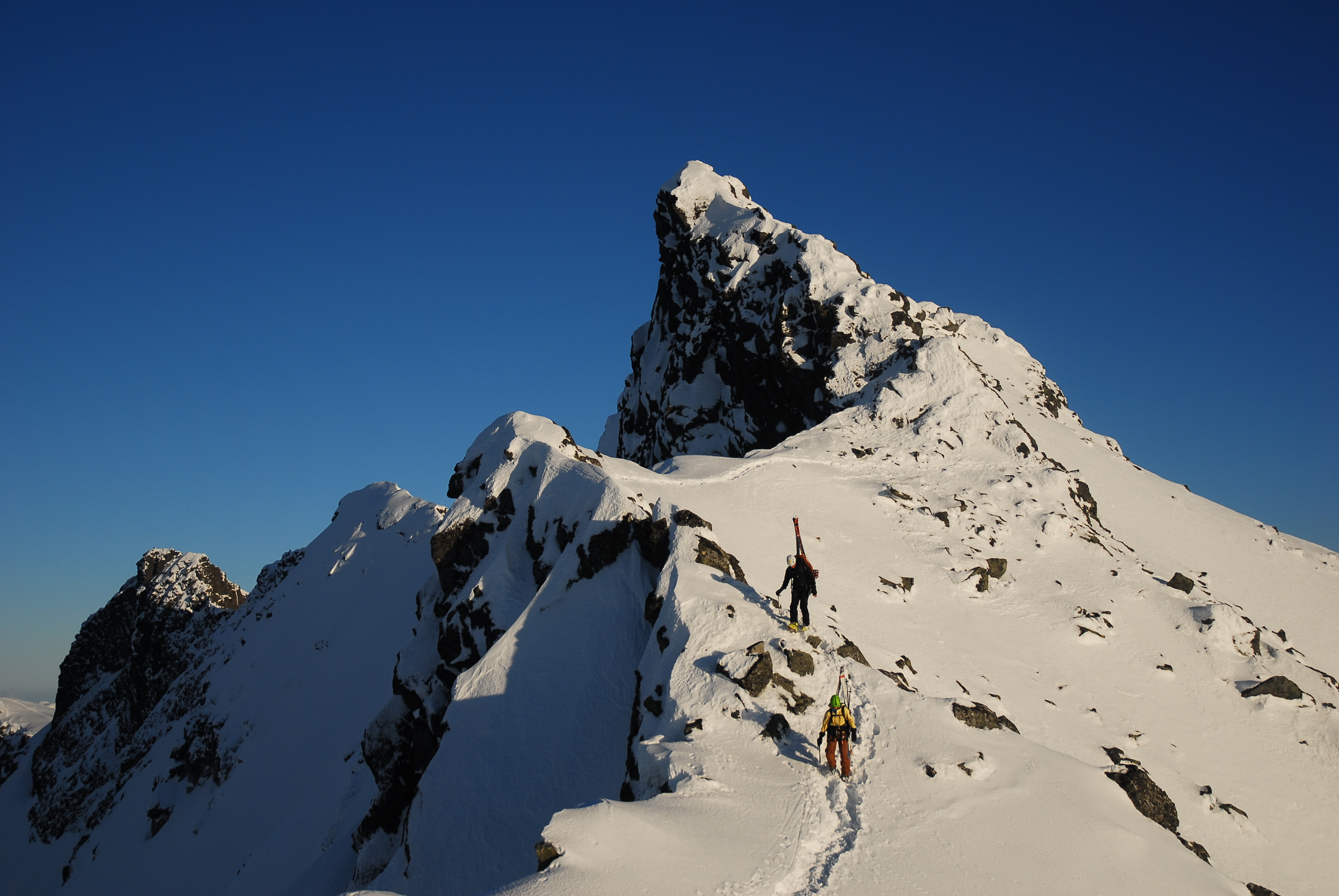 Dyrhaugstind, fortopp før Store